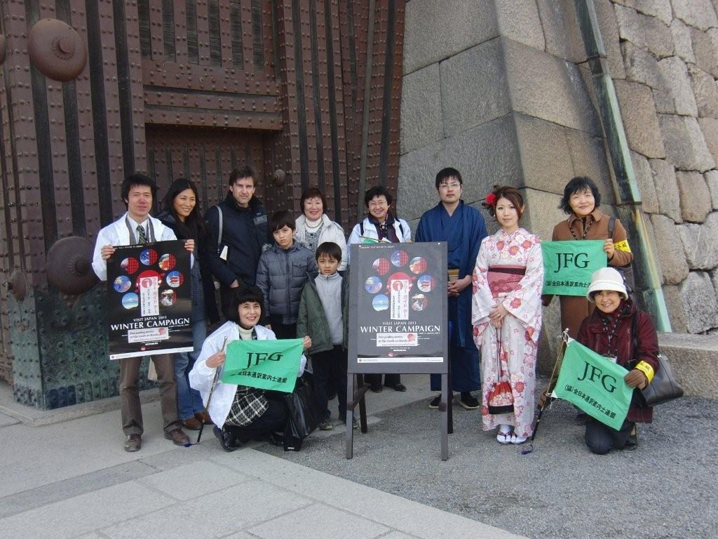 ビジットジャパンキャンベーン参加